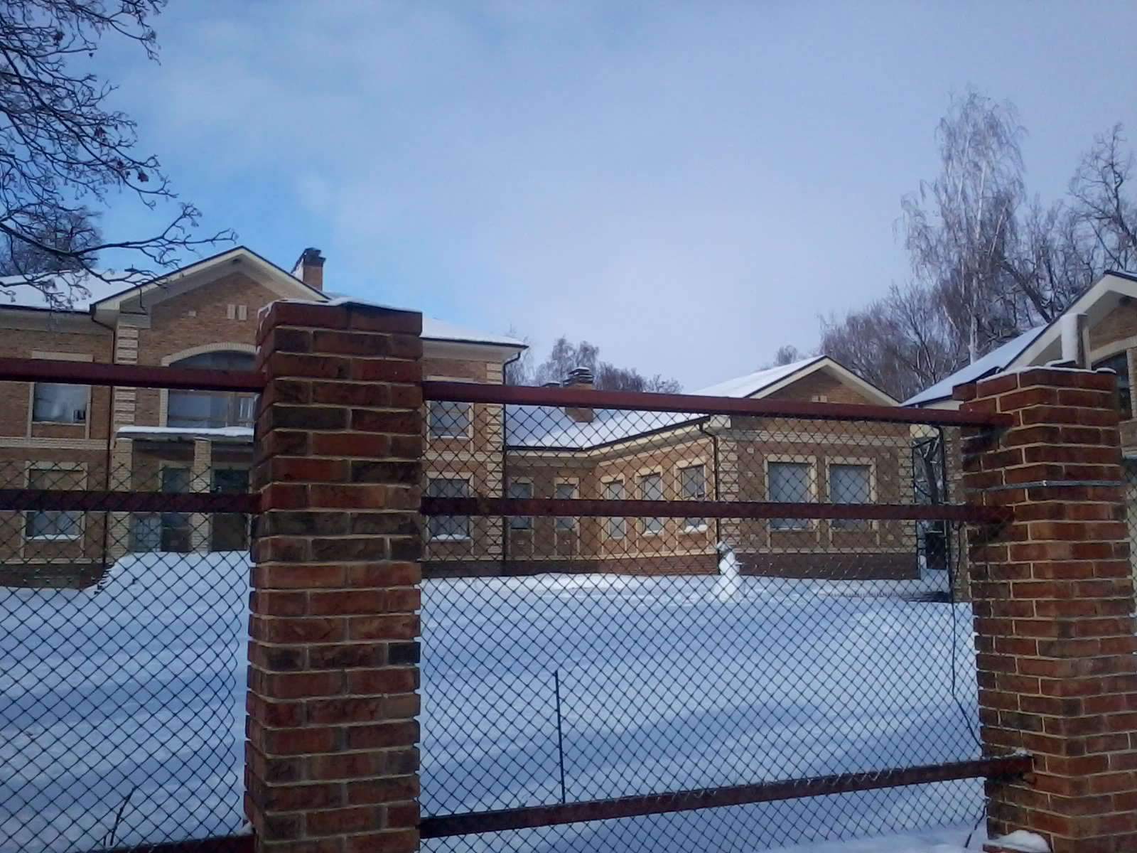 Особняк в Кузьминовском